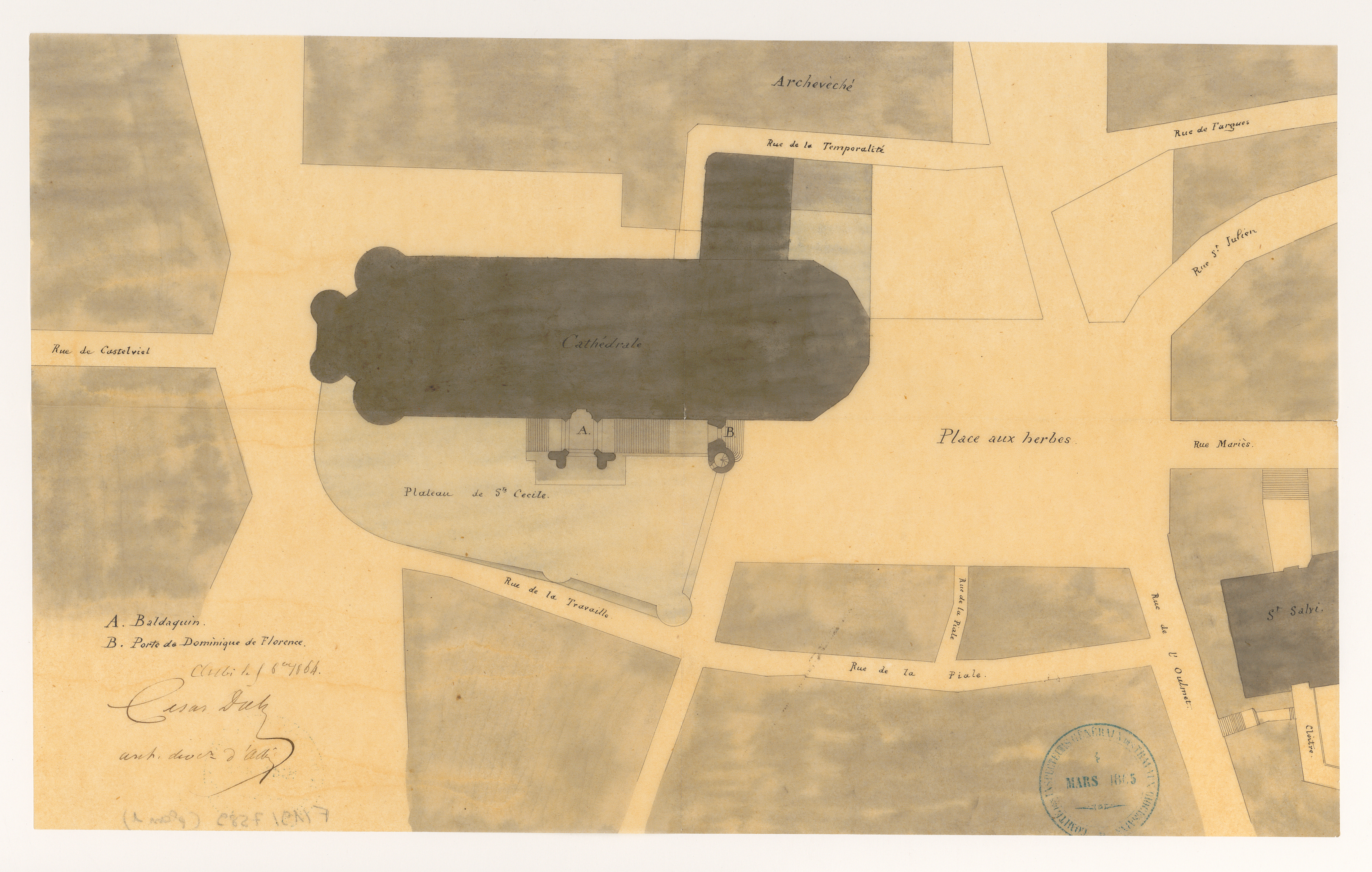 Projet de restauration de la porte de Dominique de Florence et du baldaquin. Plan issu des dossiers de travaux de restauration des cathédrales (1802-1912), conservés aux Archives nationales (inventaire et autres documents numérisés consultables en ligne).